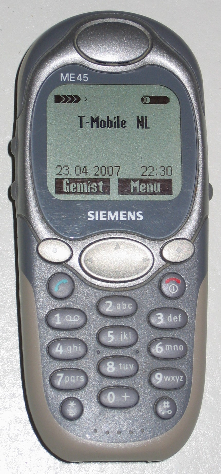 Siemens ME45 mobile phone